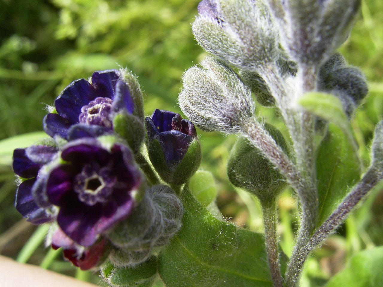 Cynoglossum officinale, Scheveningse duinen, 29 mei 2004, photo from TeunSpaans first version nl.wikipedia 08:04, 15. Jun 2004 . . TeunSpaans (184028 bytes) (Scheveningse duinen, 29 mei 2004, eigenwerk)